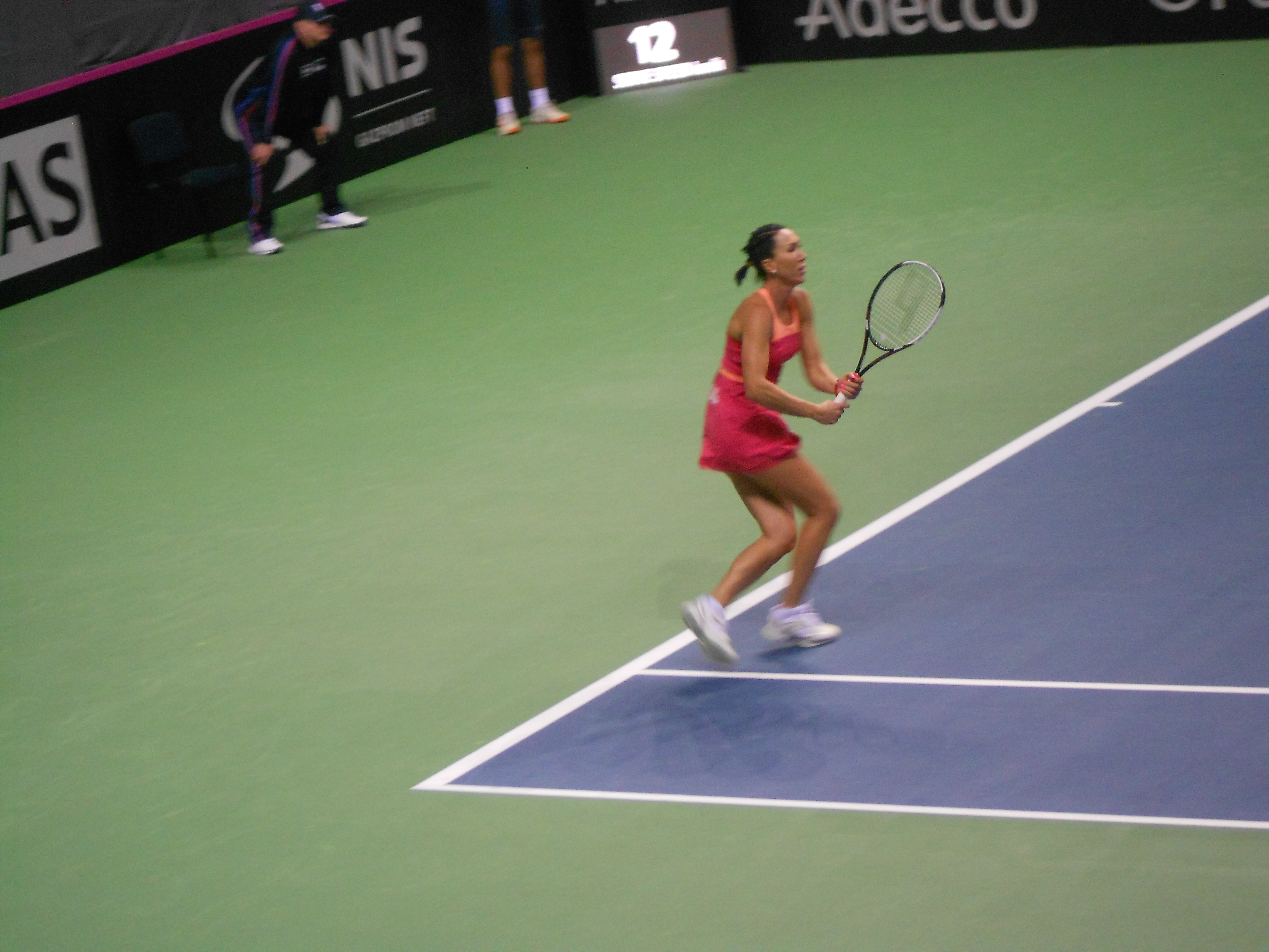 Јелена Јанковић у мечу Фед купа против Шпаније 2016.